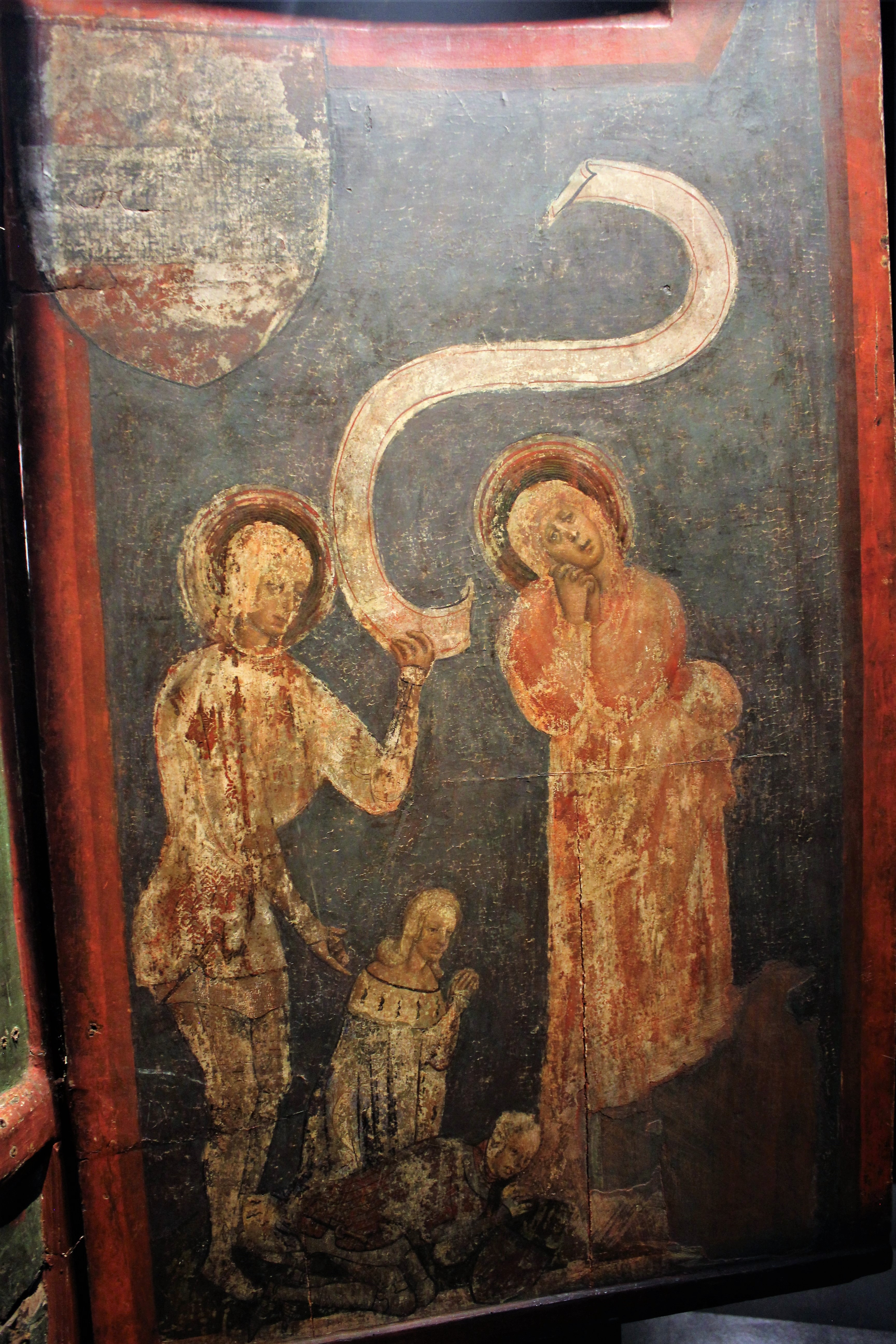 Linke Flügelaußenseite mit dem österreichischen Bindenschild, der Gottesmutter Maria und vermutlich dem Ritterheiligen Georg, der ein unbeschriftetes Spruchband hält. Verkleinert knien darunter Herzog Leopold III. von Österreich und seine Gemahlin Viridis Visconti von Mailand, eines der Stifterpaare.